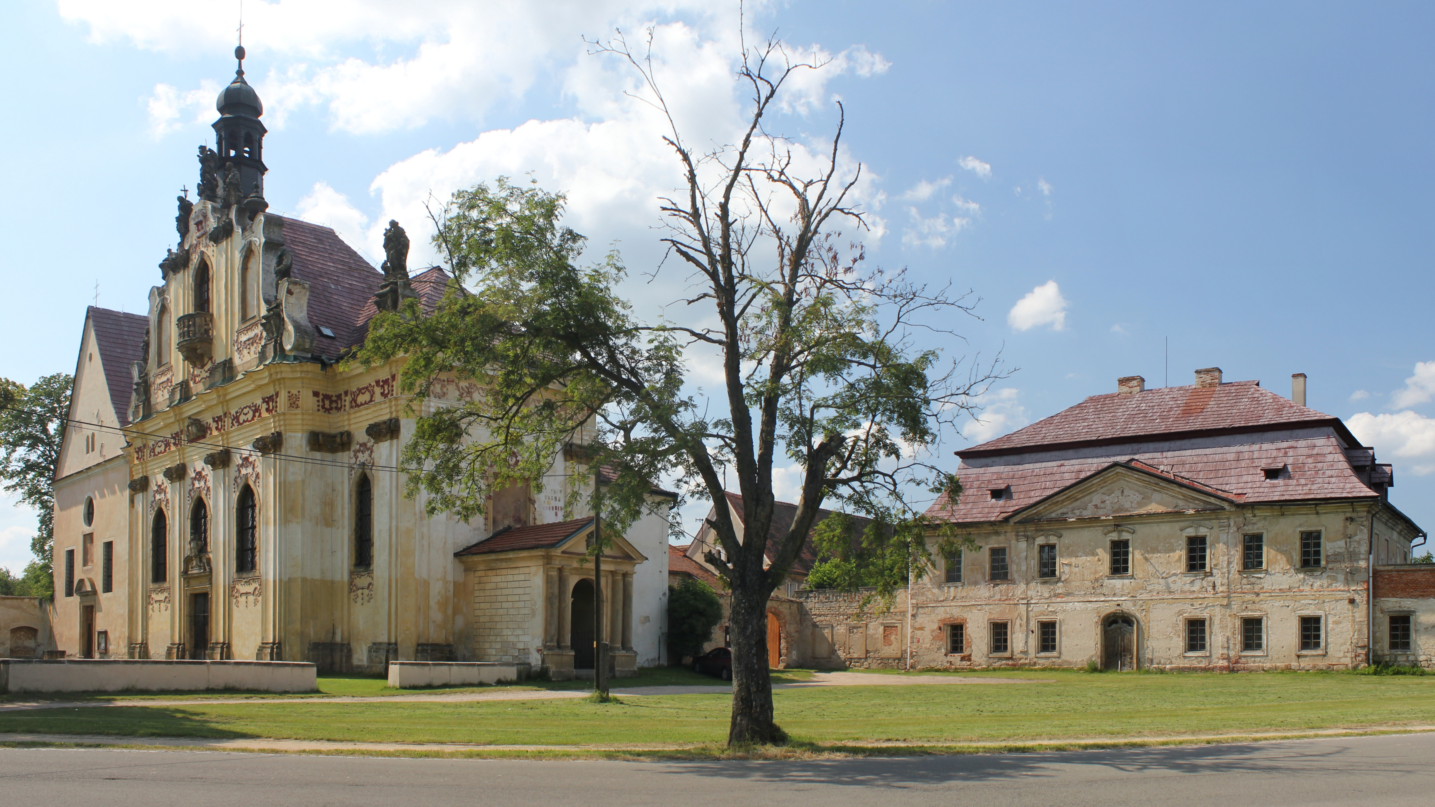 Klášter býv. kapucínský (Mnichovo Hradiště), V Lípách 151, Mnichovo Hradiště